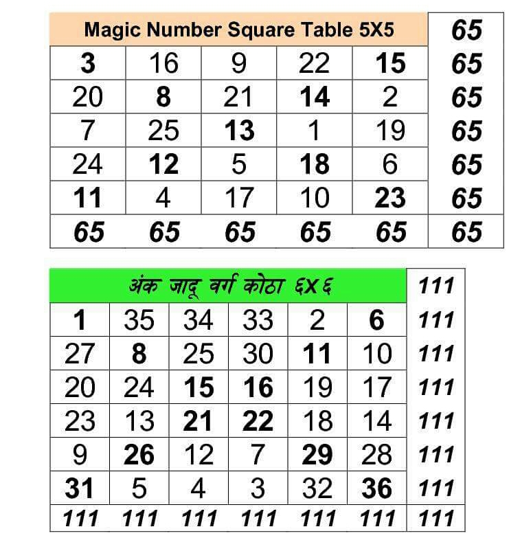 नेपाली: २५ कोठे र ३६ कोठे अङ्क जादु वर्ग तालिका